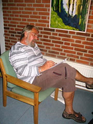 Jag har själv tagit bilden med digitalkamera sommaren 2006.